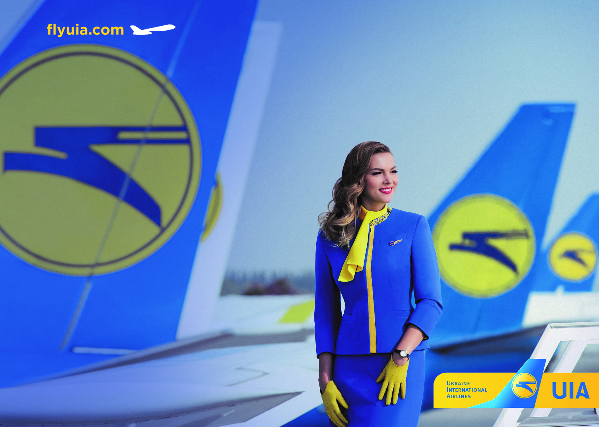 UIA crew aircraft